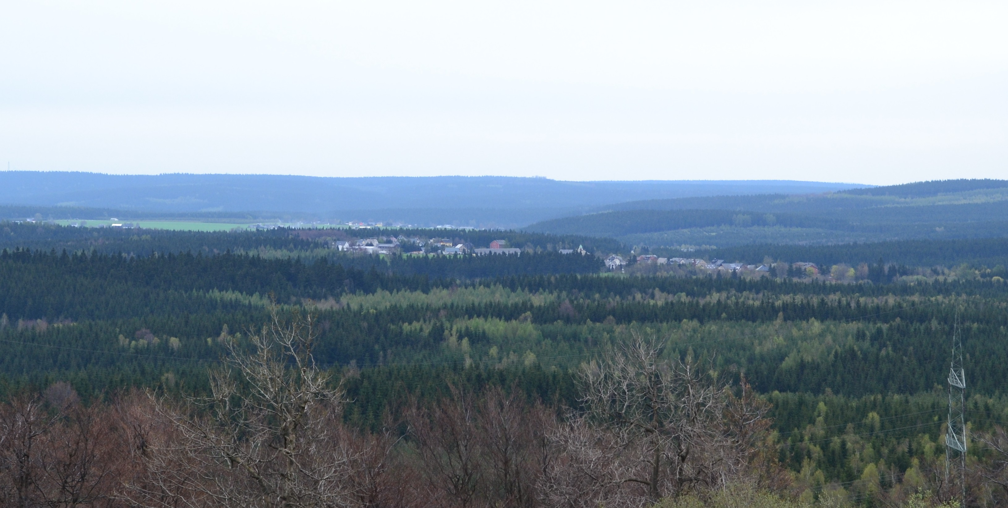 Blick auf Reitzenhain (Ortsteil der Bergstadt Marienberg) im Erzgebirge, gesehen vom Hirtstein. Im Hintergrund sind Häuser von Kühnhaide erkennbar.